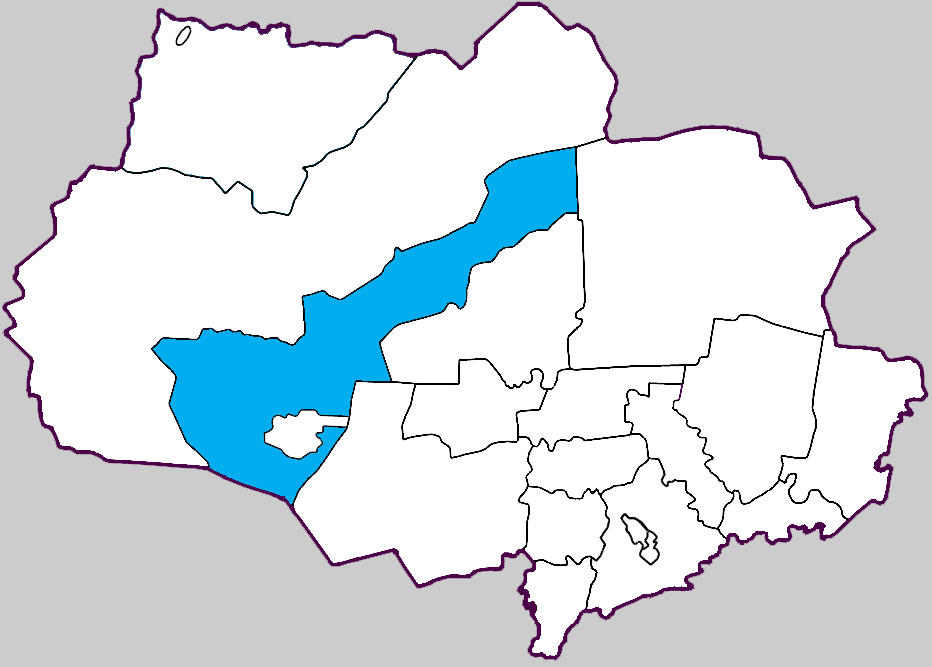 Парабельский район Томской области